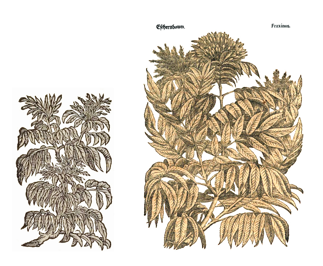 Abbildung von Fraxinus ornus